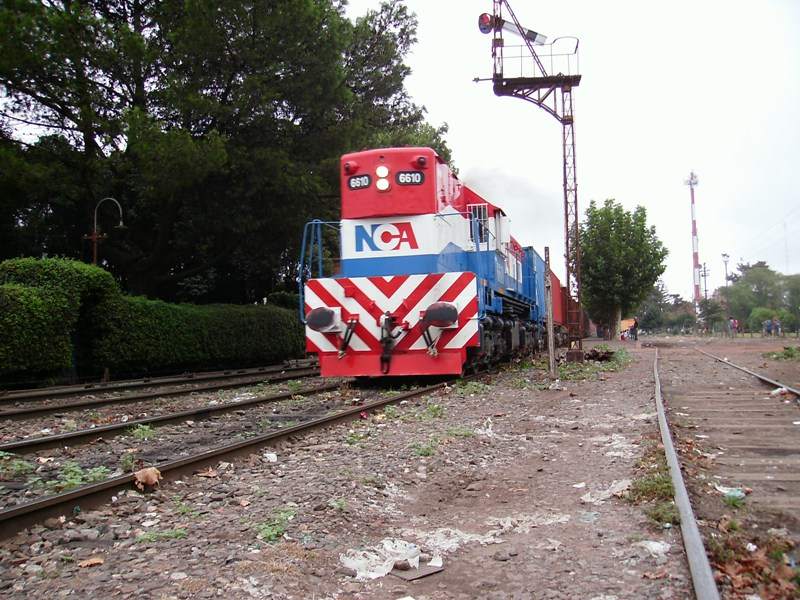 EMD GR12 de NCA pasando por la estacion Escobar.